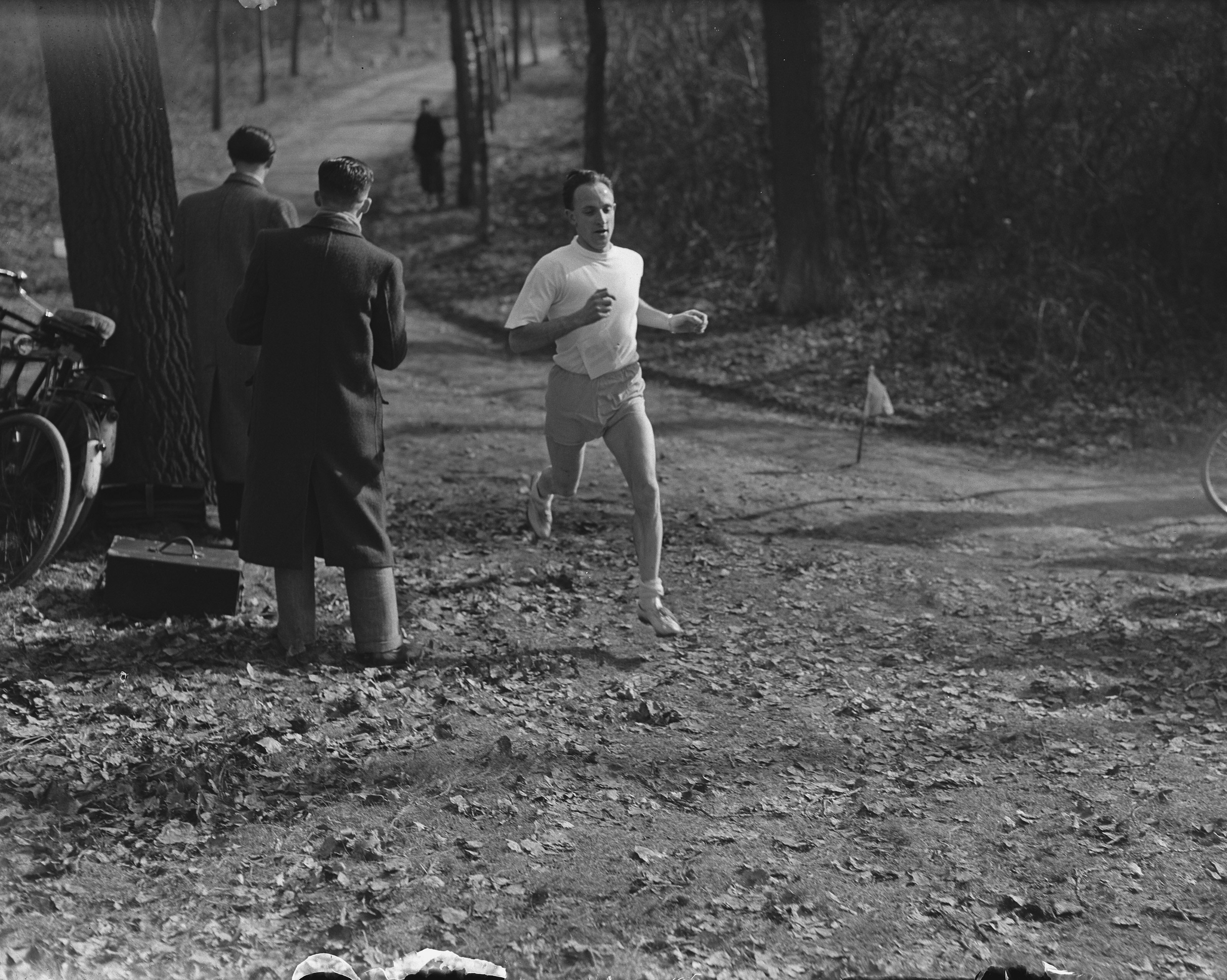 Collectie / Archief : Fotocollectie Anefo Reportage / Serie : [ onbekend ] Beschrijving : 12 kilometer veldloop Kampioenschap van Nederland op de Ambyer Heide bij Maastricht, winnaar: Jef Lataster Datum : 4 maart 1951 Locatie : Maastricht Trefwoorden : KAMPIOENSCHAPPEN, VELDLOOP, Winnaars Fotograaf : Pot, Harry / Anefo Auteursrechthebbende : Nationaal Archief Materiaalsoort : Glasnegatief Nummer archiefinventaris : bekijk toegang 2.24.01.09 Bestanddeelnummer : 904-4545